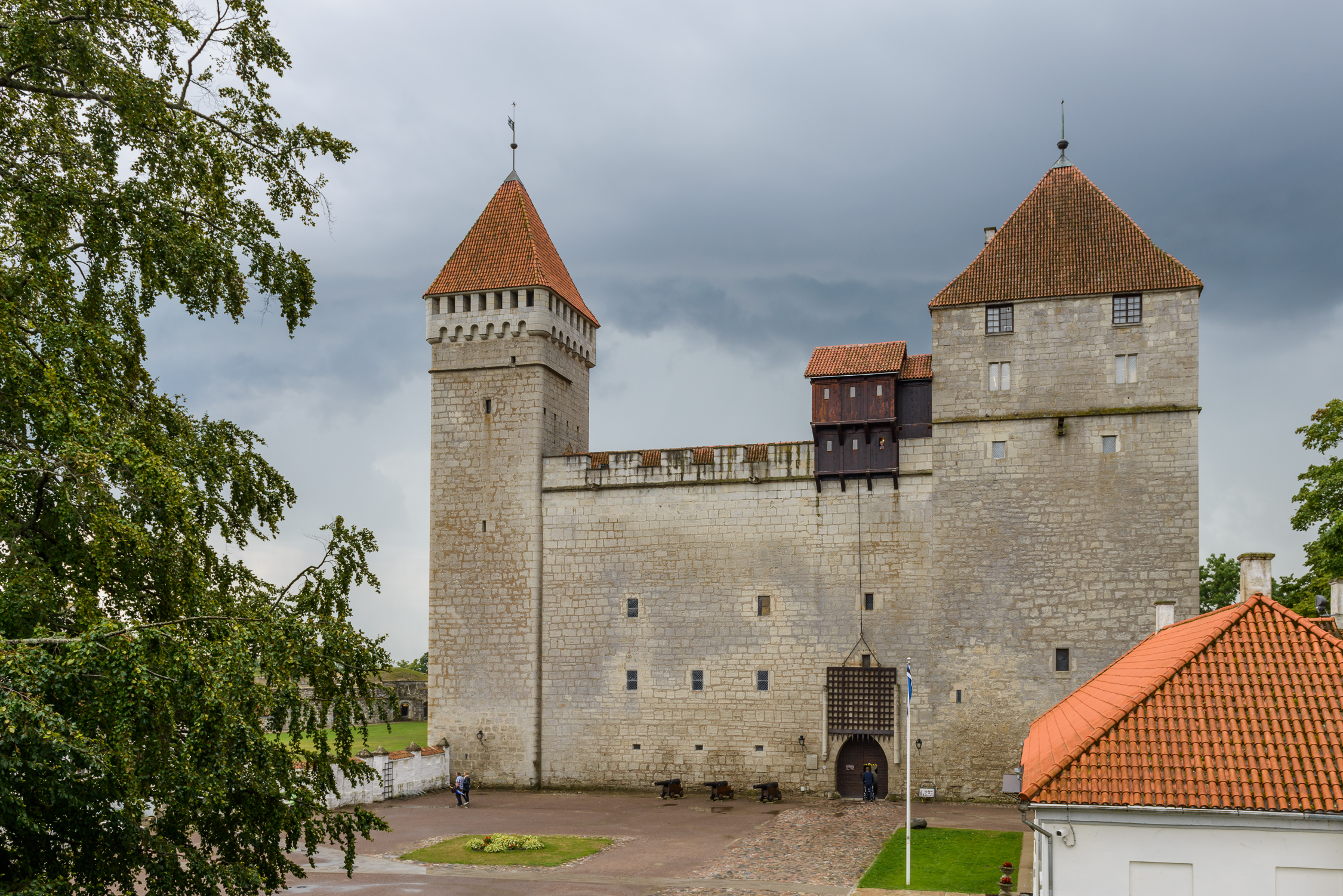 Kuressaare linnus